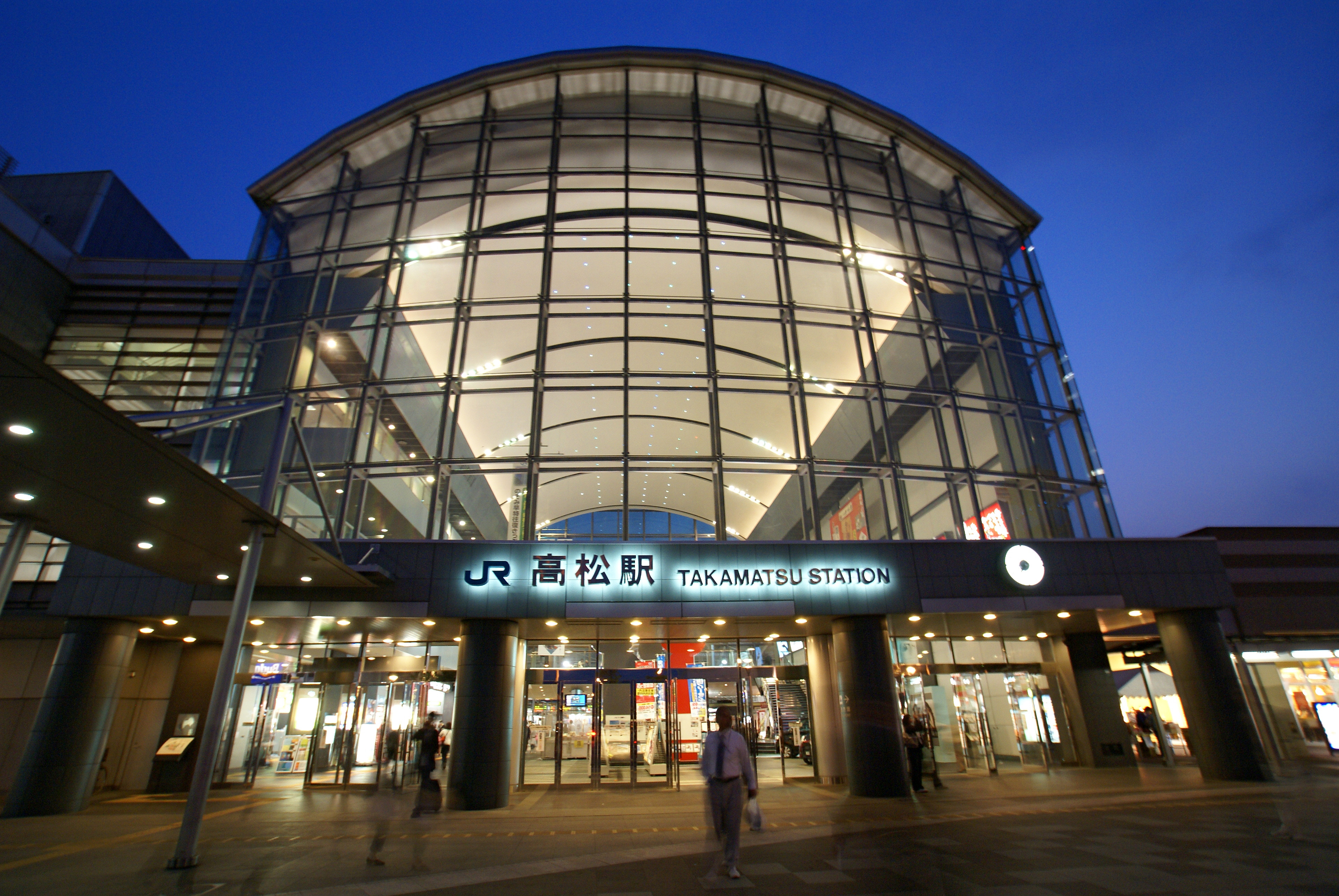 Takamatsu Station in Takamatsu, Kagawa, Japan